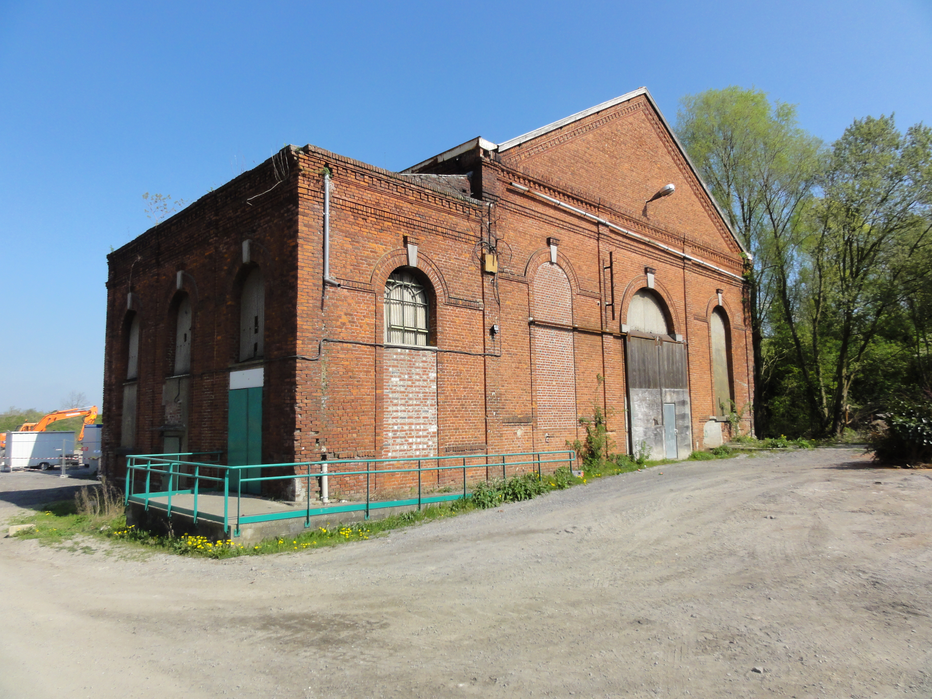 La Fosse Boca ou n° 9 de la Compagnie des mines de Douchy était un charbonnage constitué d'un seul puits situé à Douchy-les-Mines, Nord, Nord-Pas-de-Calais, France.